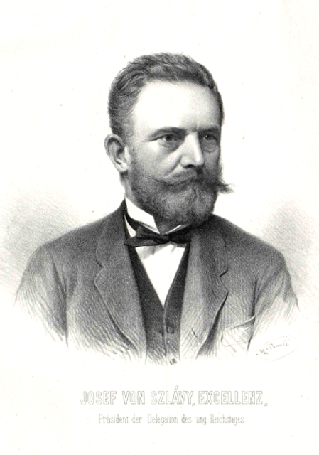 Okányi és érkenézi Szlávy József (Győr, 1818. november 23. – Zsitvaújfalu, 1900. augusztus 8.) magyar ügyvéd, bányamérnök, politikus, több kormány minisztere, 1872–1874 között magyar miniszterelnök, 1894–1896 között a főrendiház elnöke, a Magyar Tudományos Akadémia tagja.